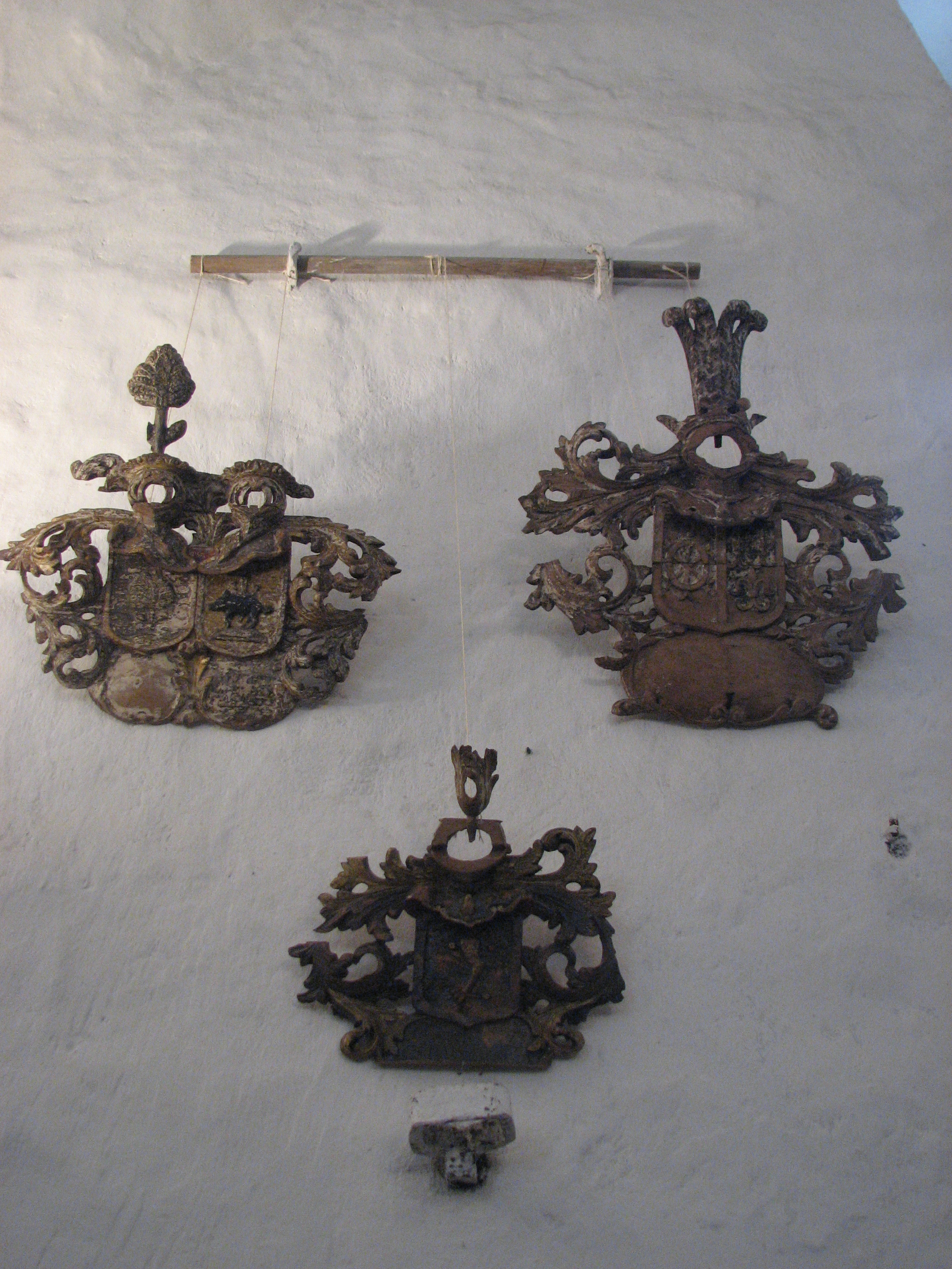 Jõhvi church, Jõhvi, Estonia